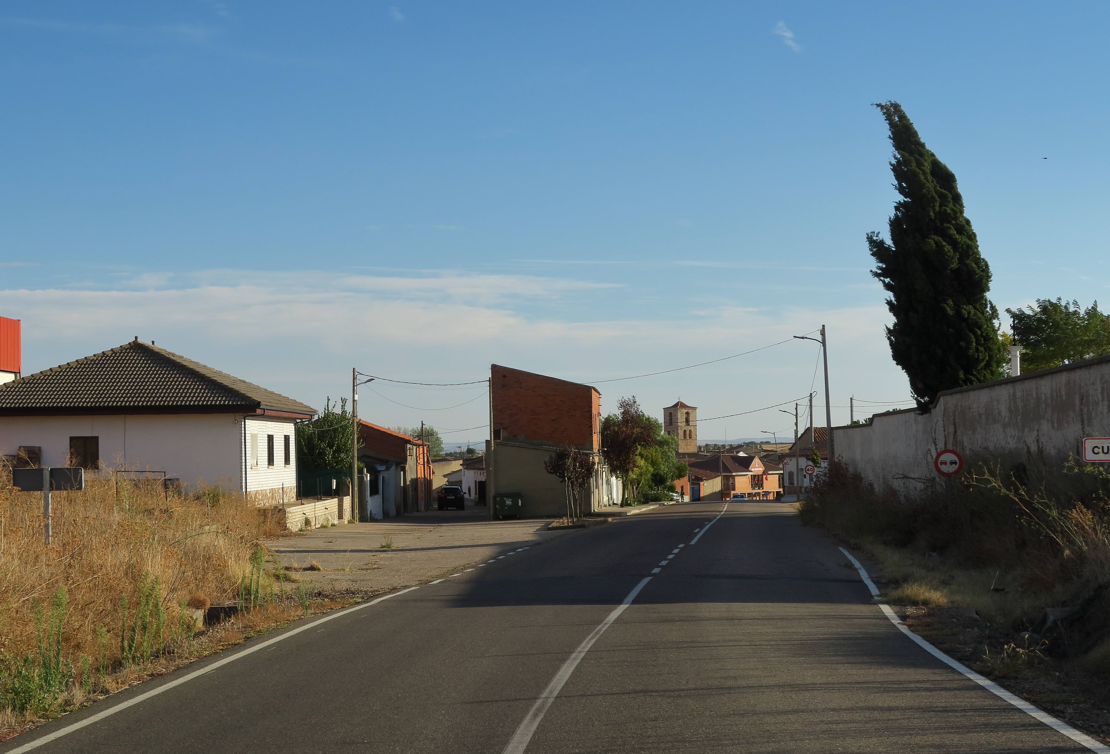 Cubillos, vista poblacion